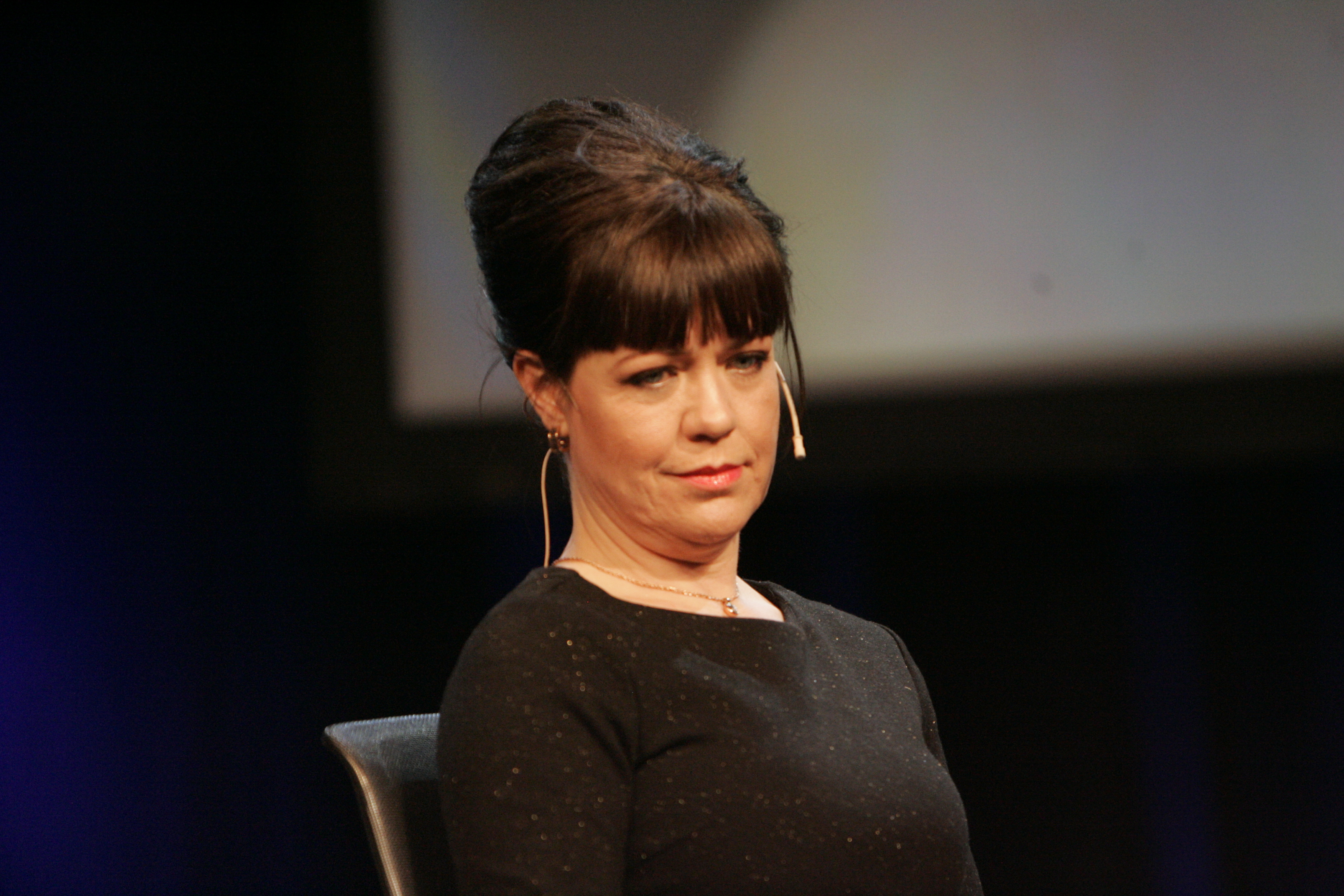 Lene Kongsvik Johansen